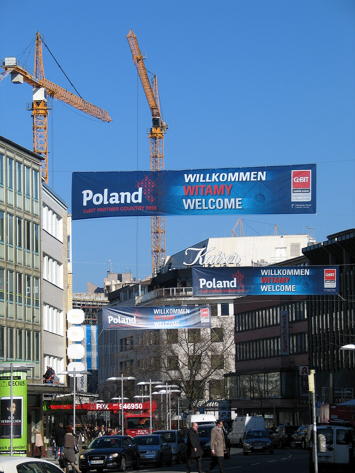 Banner zur CeBIT 2013 über der Karmarschstraße mit Begrüßung für Poland: "Willkommen, Witamy, Welcome" ...